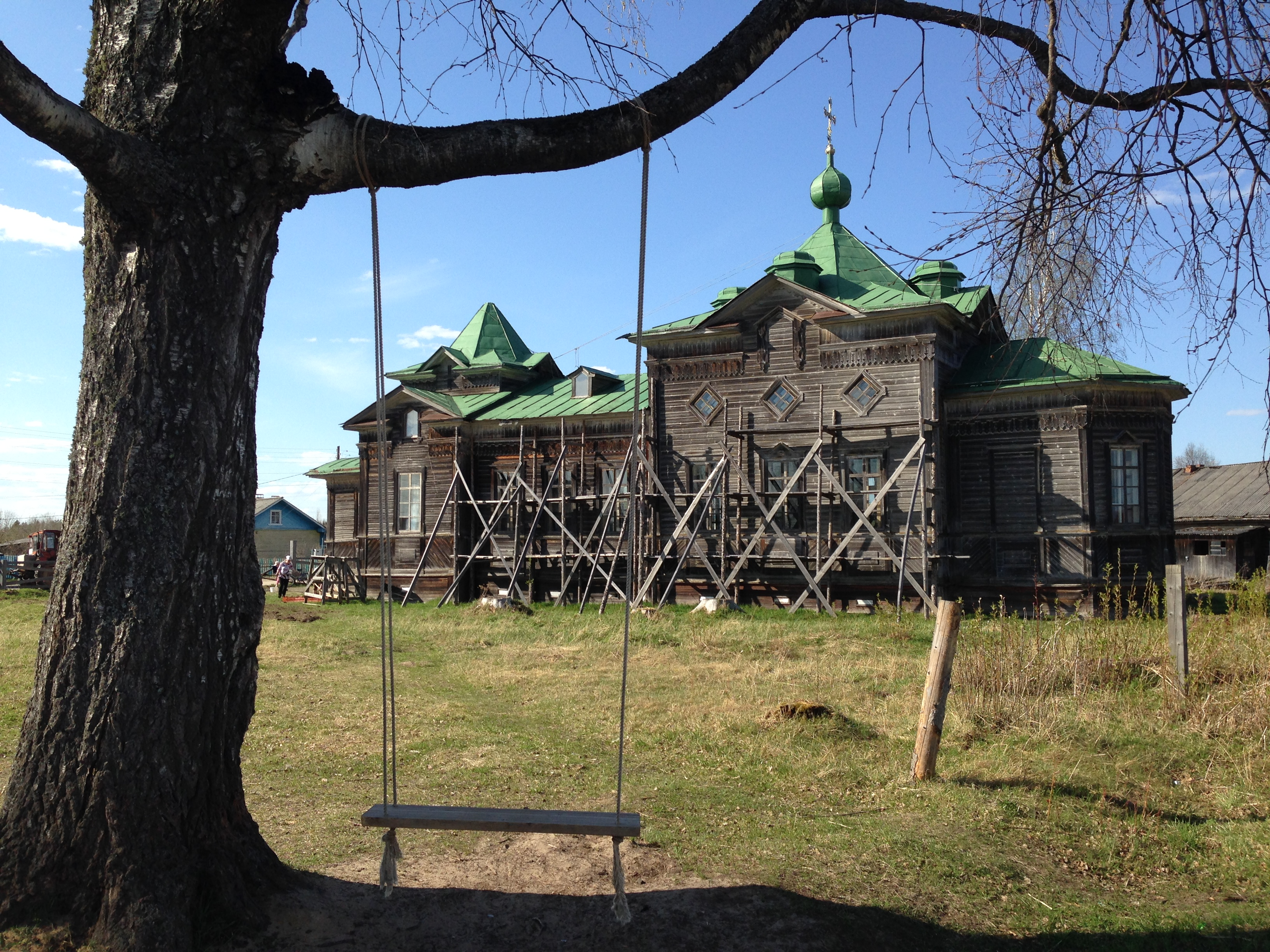 Вельский район Архангельской области